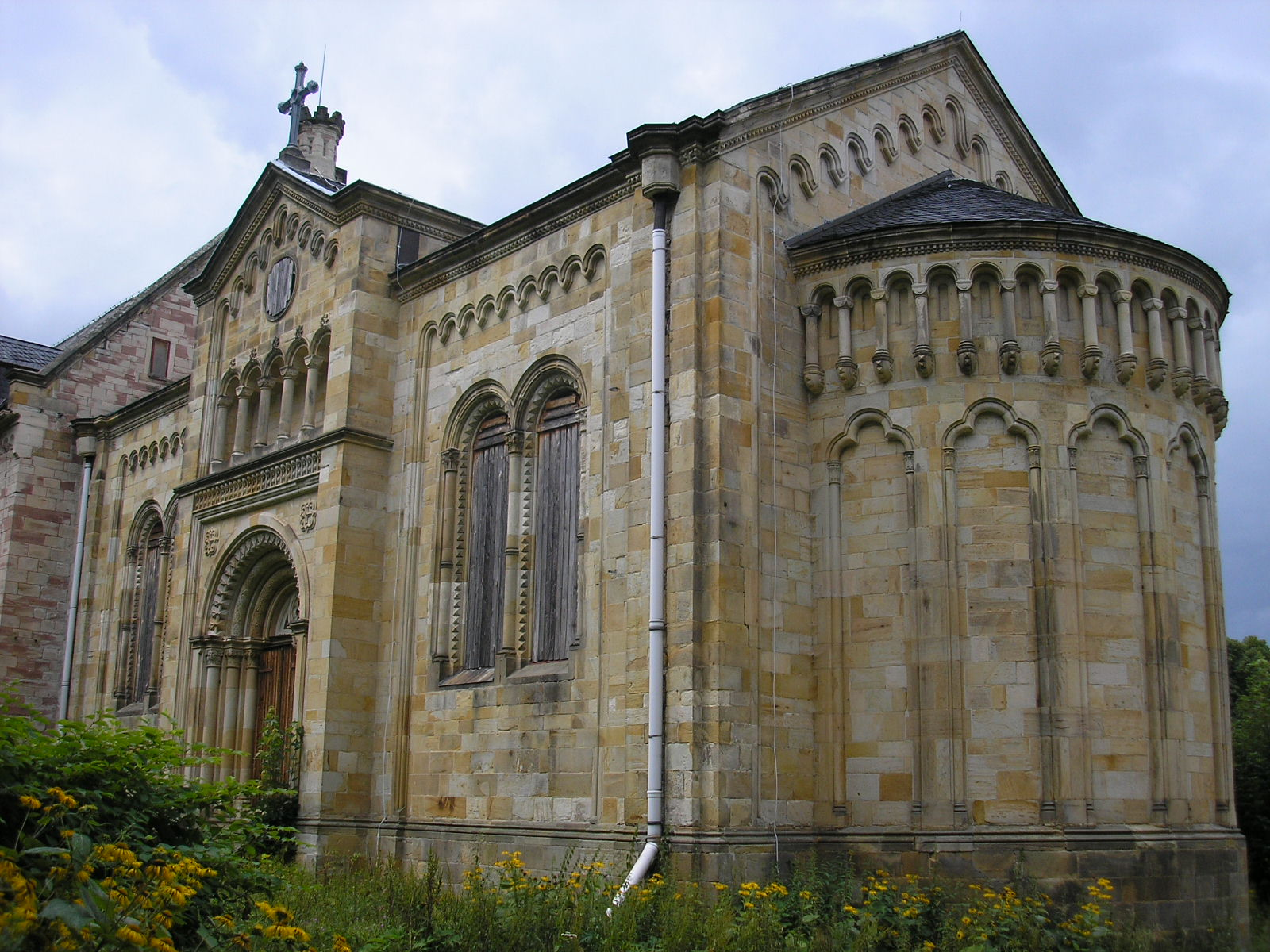 Die Kapelle des Schlosses Reinhardsbrunn bei Friedrichroda (Thüringen).